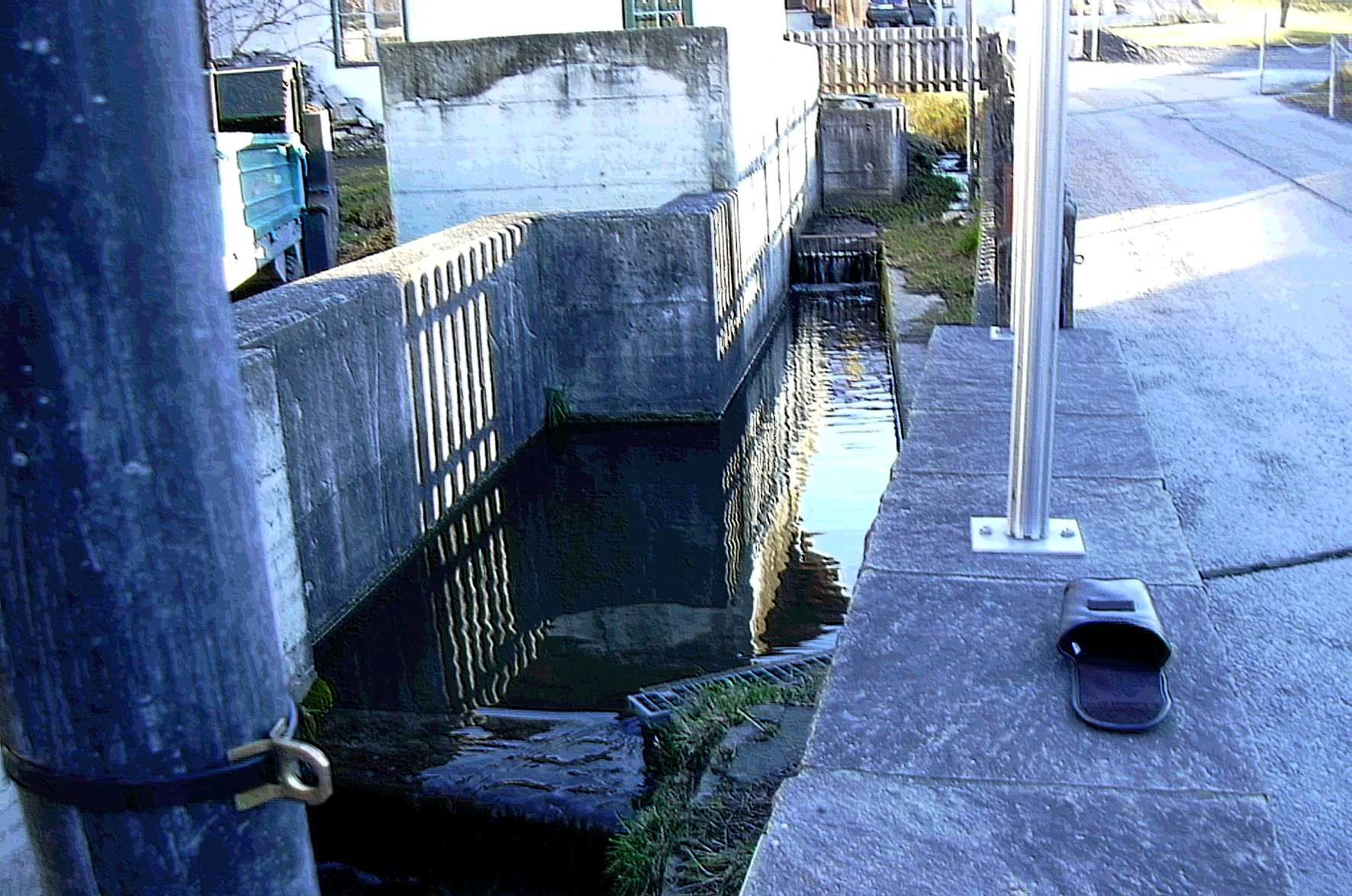 Lanser Bach durch Dorfmitte